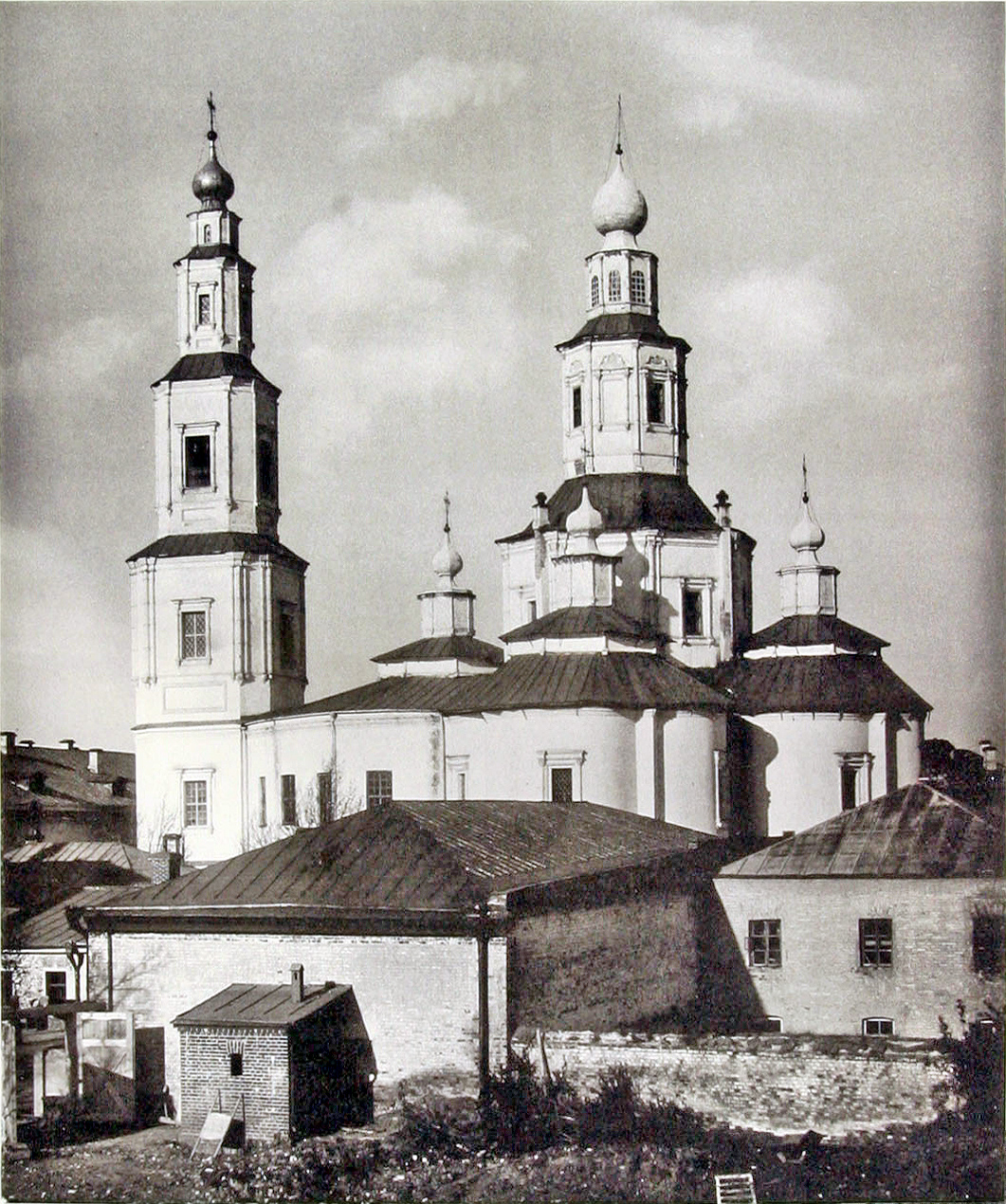 Церковь Воздвижения Креста Господня упразднённого в 1814 году Воздвиженского монастыря.